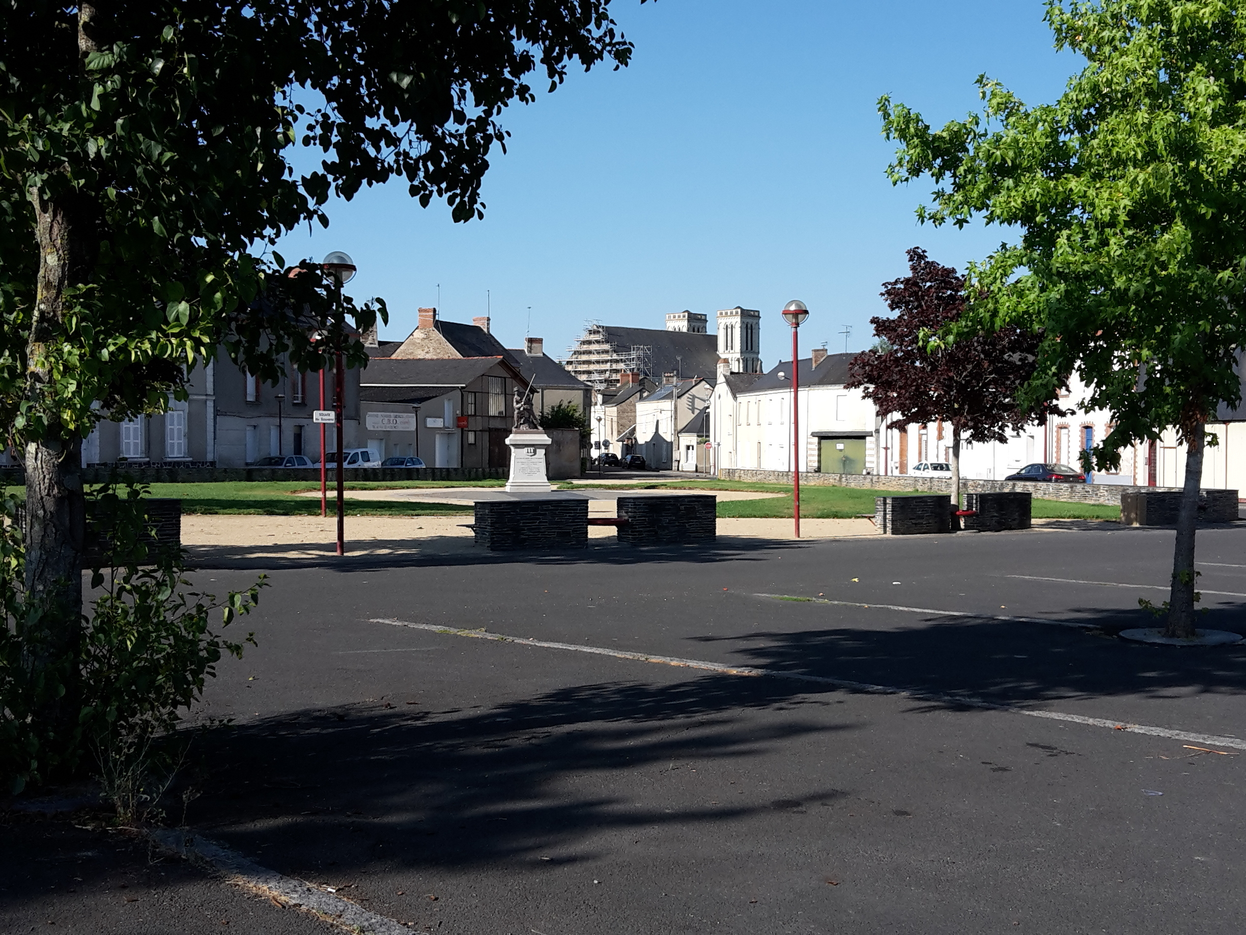 Place Saint-Nicolas à Candé, Maine-et-Loire, France.